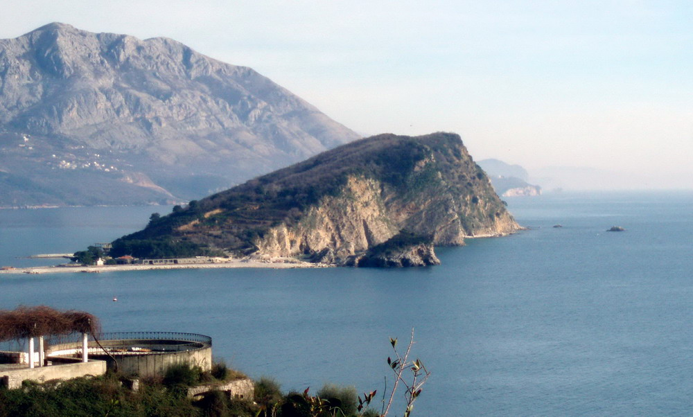 Školj